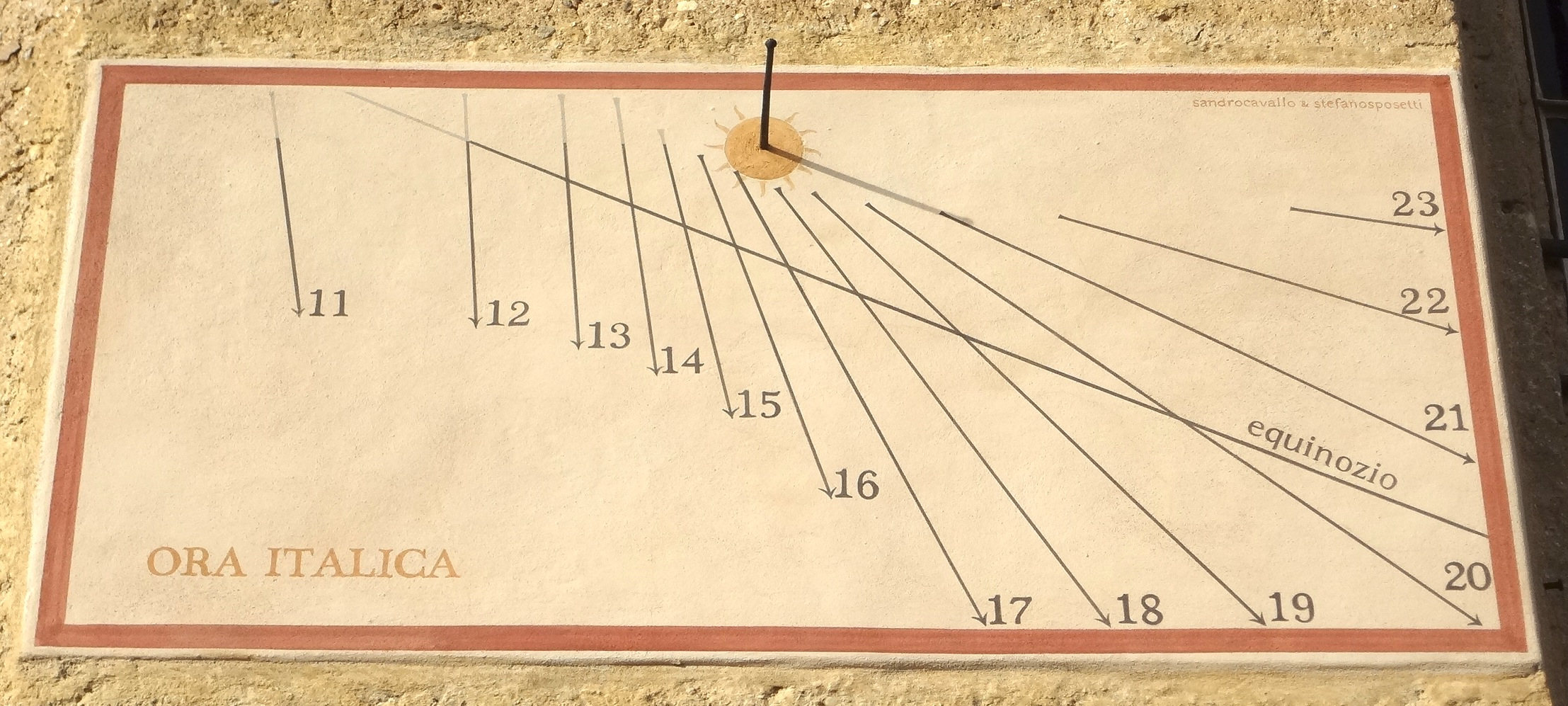 Cadran solaire "Ora Italica", déclinant, église de Comano (Tessin). Après l'an mil, toute la péninsule italienne s'est mise à mesurer le temps différemment des autres pays d’Europe. On nommait cette division horaire “ORA ITALIANA” elle est restée en usage jusqu’à la fin du XVIIIe siècle. Suivant la règle de l'heure italienne, on comptait le jour de 24 heures, d'un coucher à l’autre du soleil. Au moment où l'Astre descendait au-dessous de l’horizon, il était 24 heures et c'était la fin du jour (extrait de Giovanni Paltrinieri : Gnomonista in Bologna [1]).